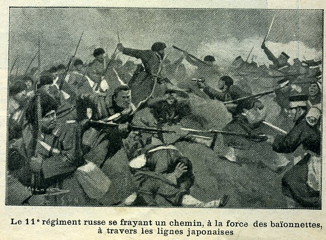 see picture